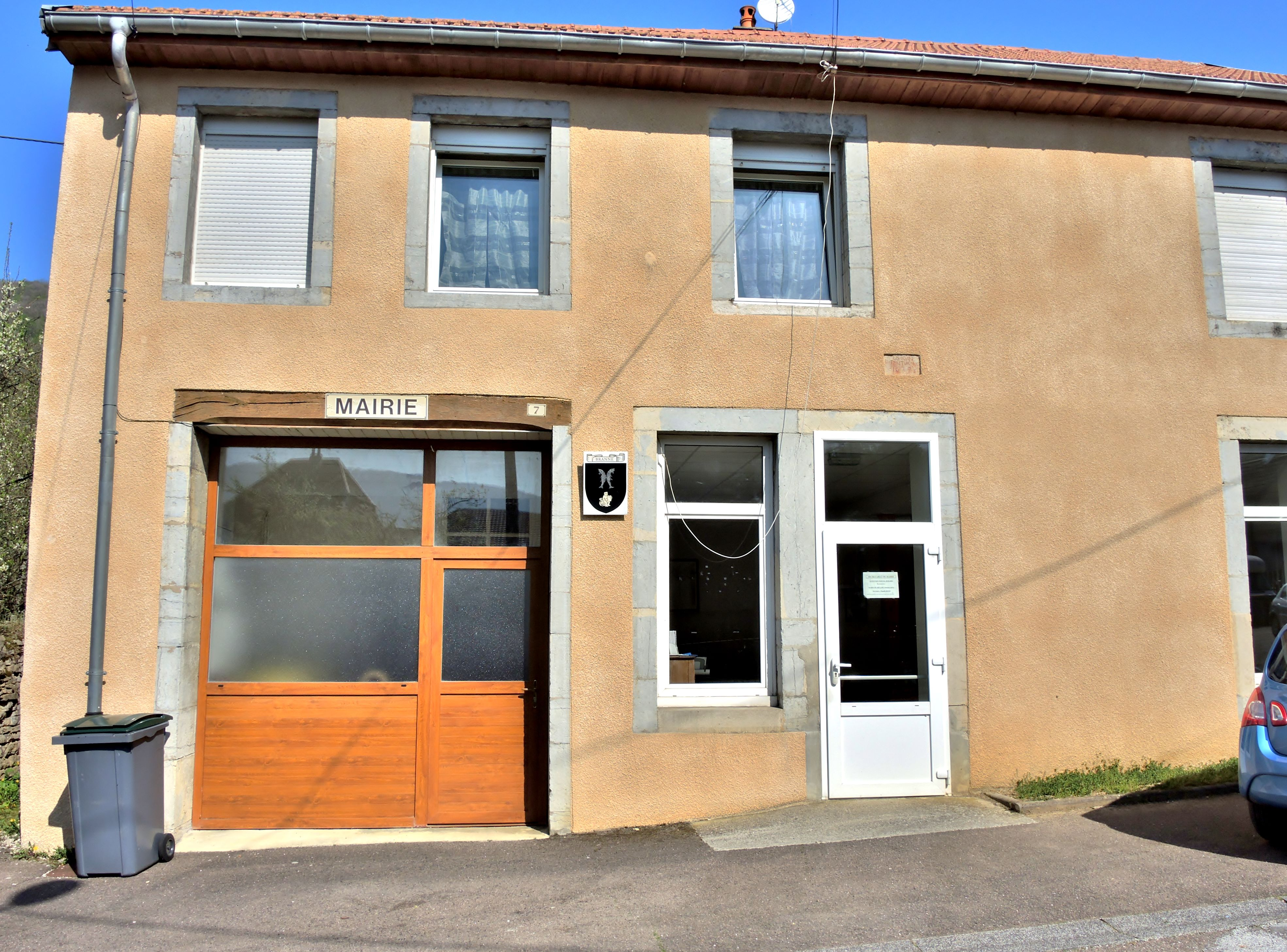 Façade de la mairie de Branne. Doubs